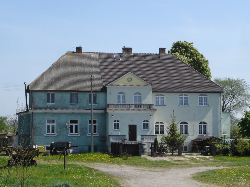 Dwór w Kurcewie, gmina Stargard Szczeciński, powiat stargardzki